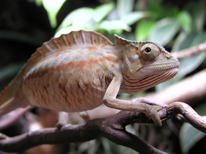 Chamaeleo cristatus, Male, Kamerun